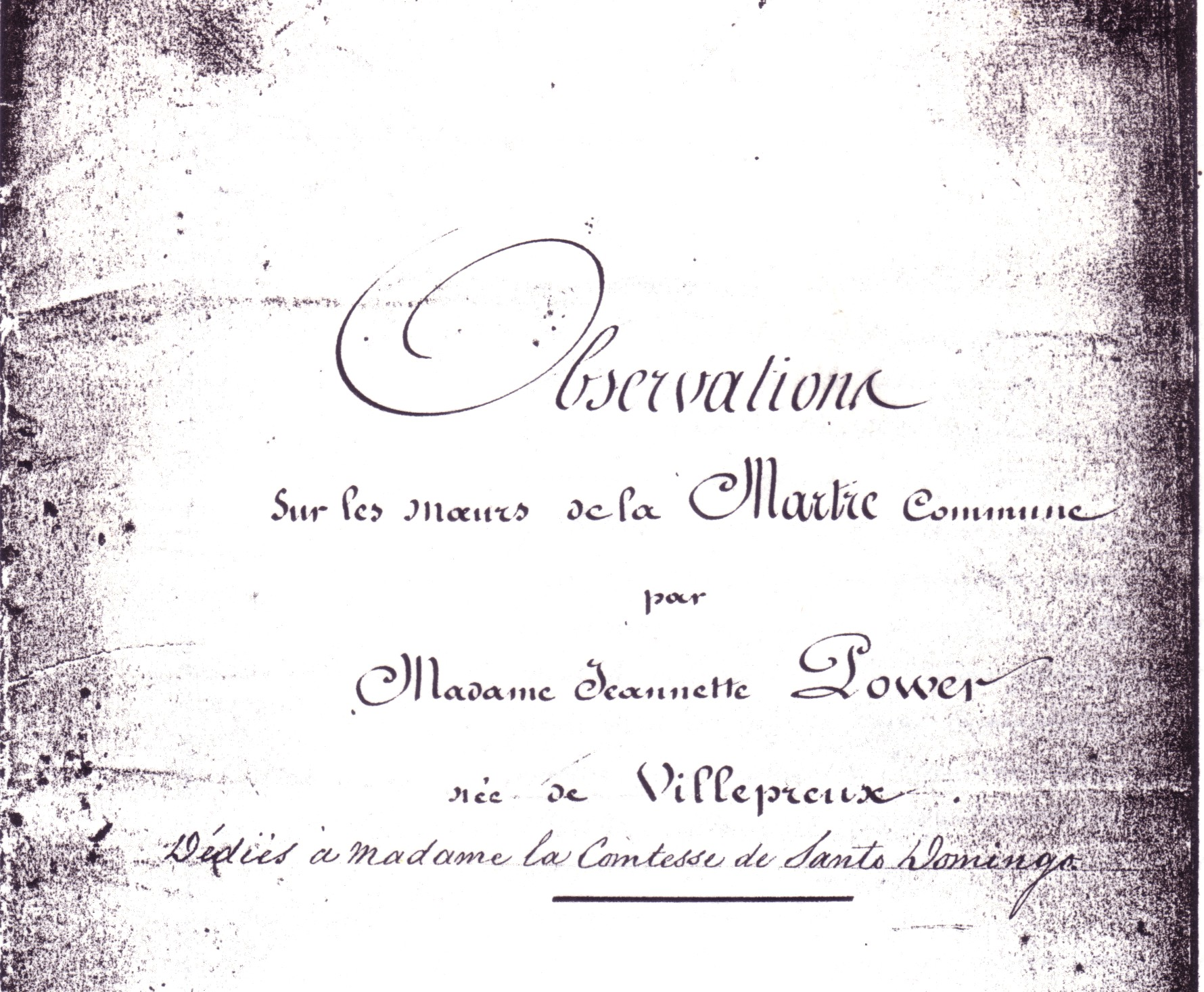 Ouvrage de Jeanne Villepreux Power